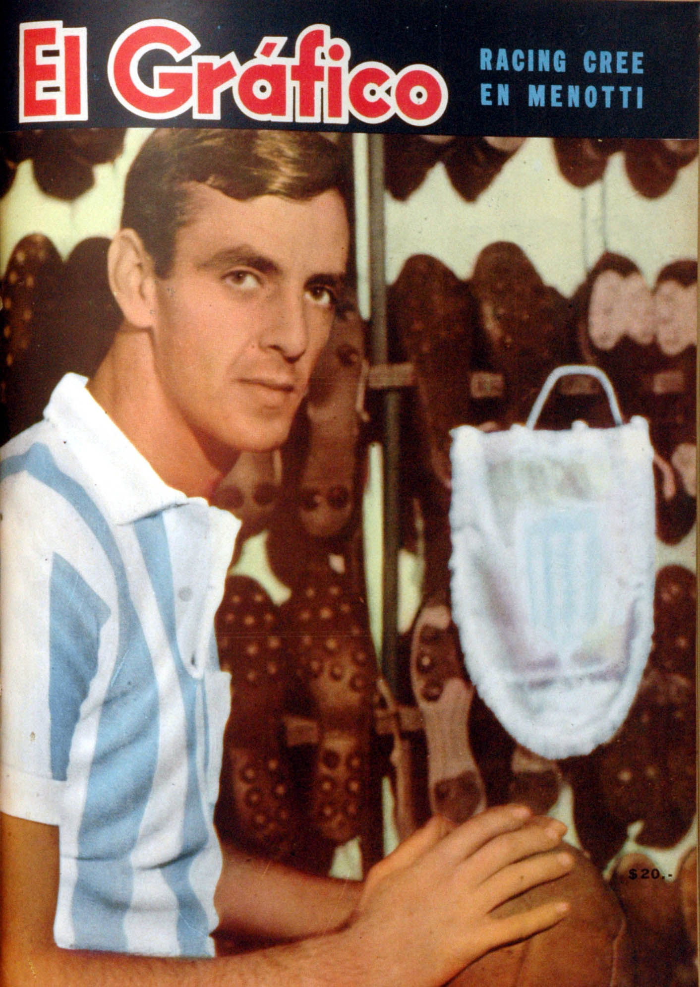 El Grafico del 25 de Marzo de 1964. Edicion 2320